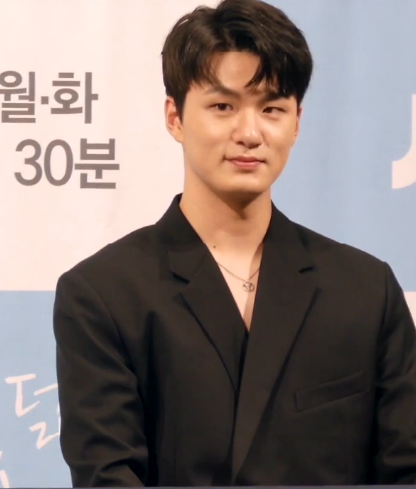 22일 오후 서울시 강남구 논현동 임피리얼 팰리스 서울에서 JTBC 새 월화드라마 '열여덟의 순간' 제작발표회가 열려 심나연PD가 배우 옹성우X김향기X신승호X강기영의 섭외 이유에 대해 설명하고 있다.